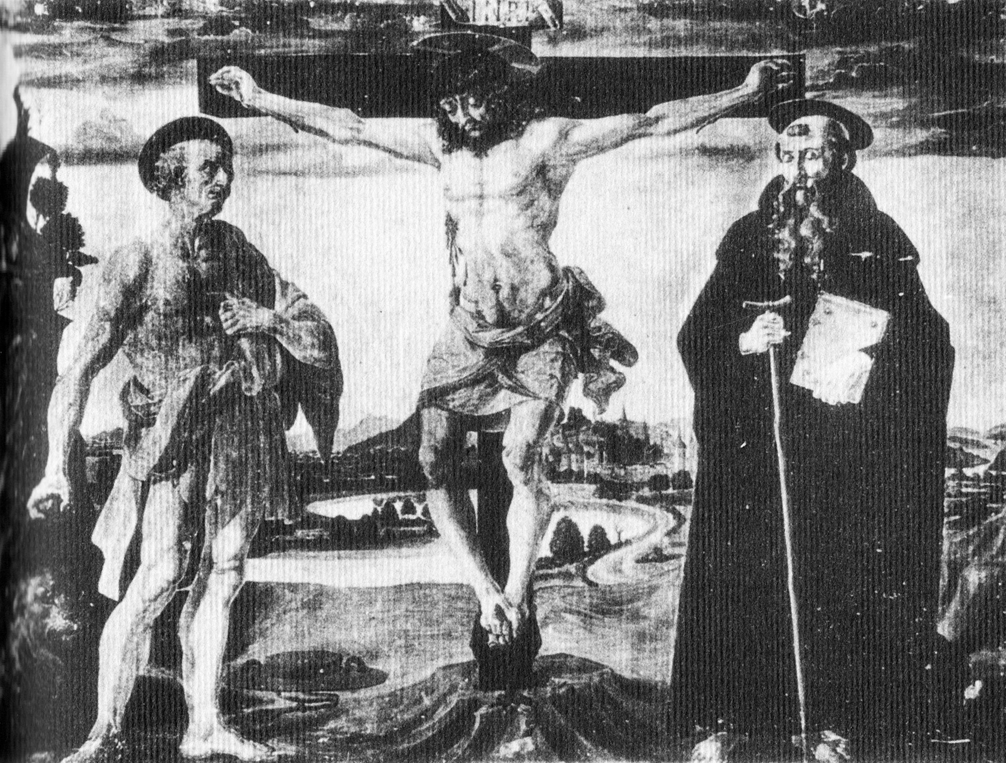 Cristo Crocefisso tra San Gerolamo e Sant'Antonio abate. Opera attribuita al Verrocchio ma anche al Perugino. Tela rubata nel 1970 dalla chiesa di santa Maria ad Argiano